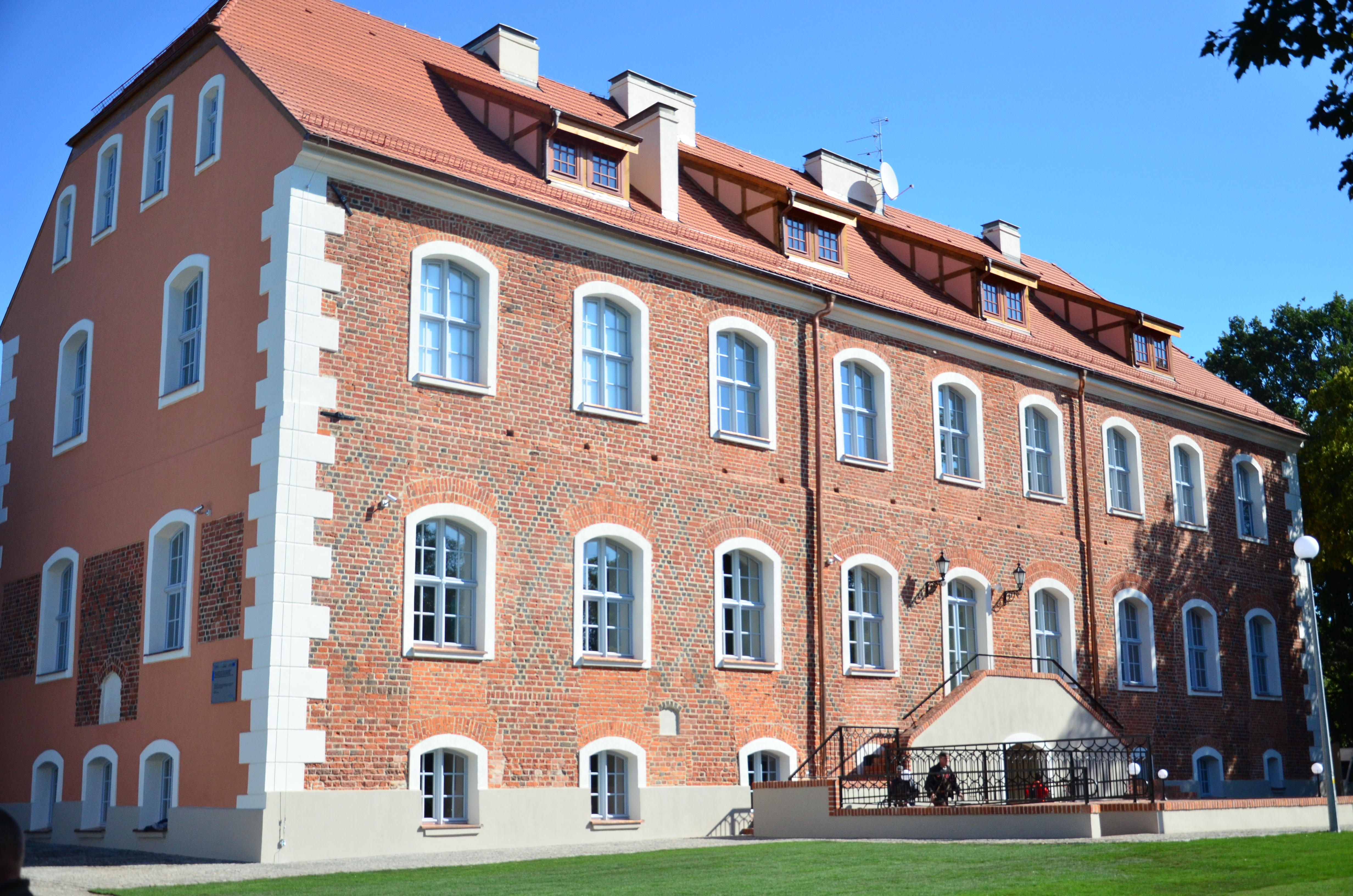 Szczecinek - zamek Książąt Pomorskich zbudowany przez Ulryka darłowskiego, (skrzydło południowe), mur., XV, 1690, XVIII, XX w.